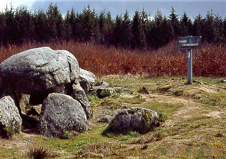 Dolmen de la Pierree Courcoulée. Landéan. Ille-et-Vilaine